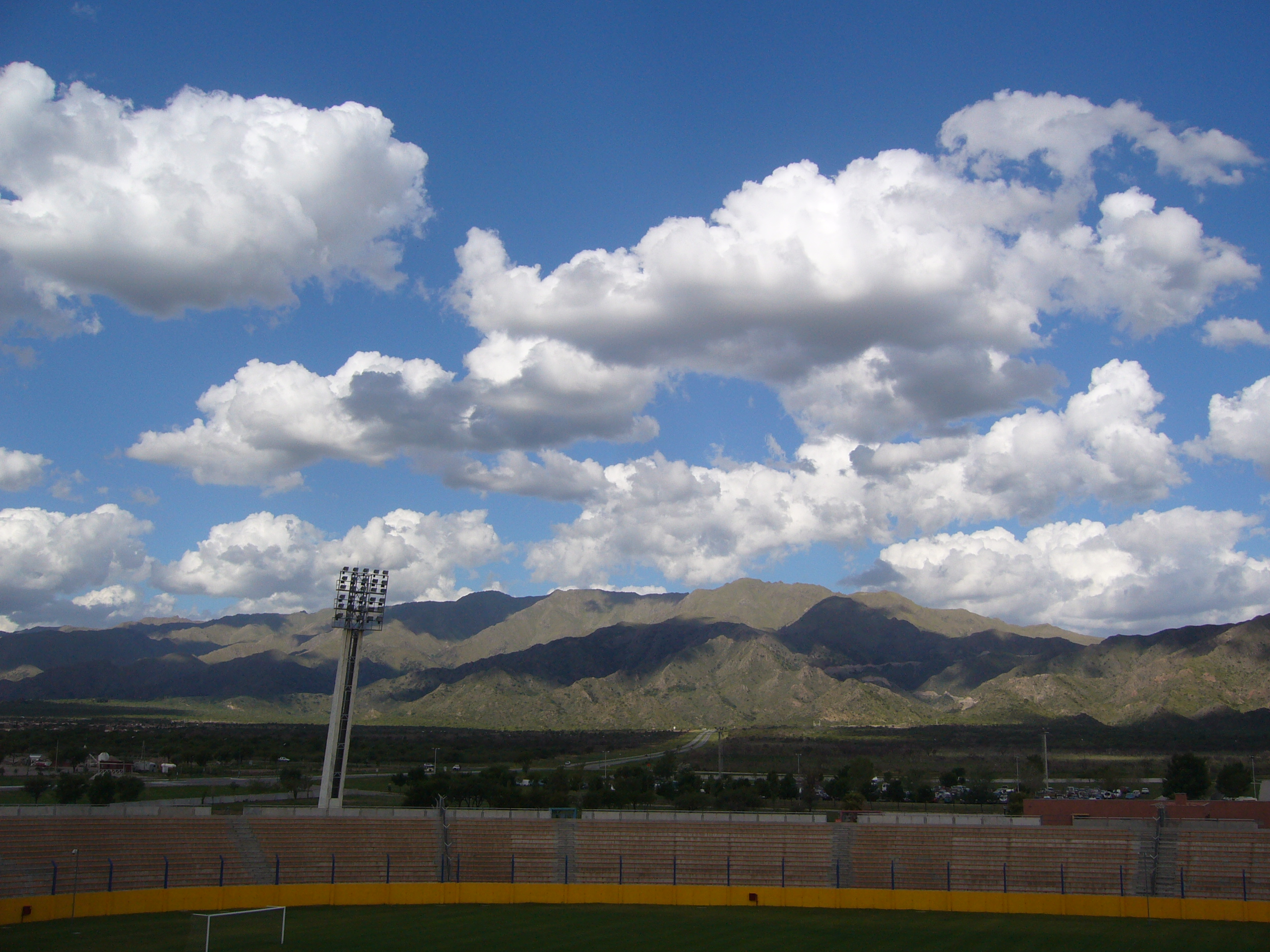 Belleza puntana